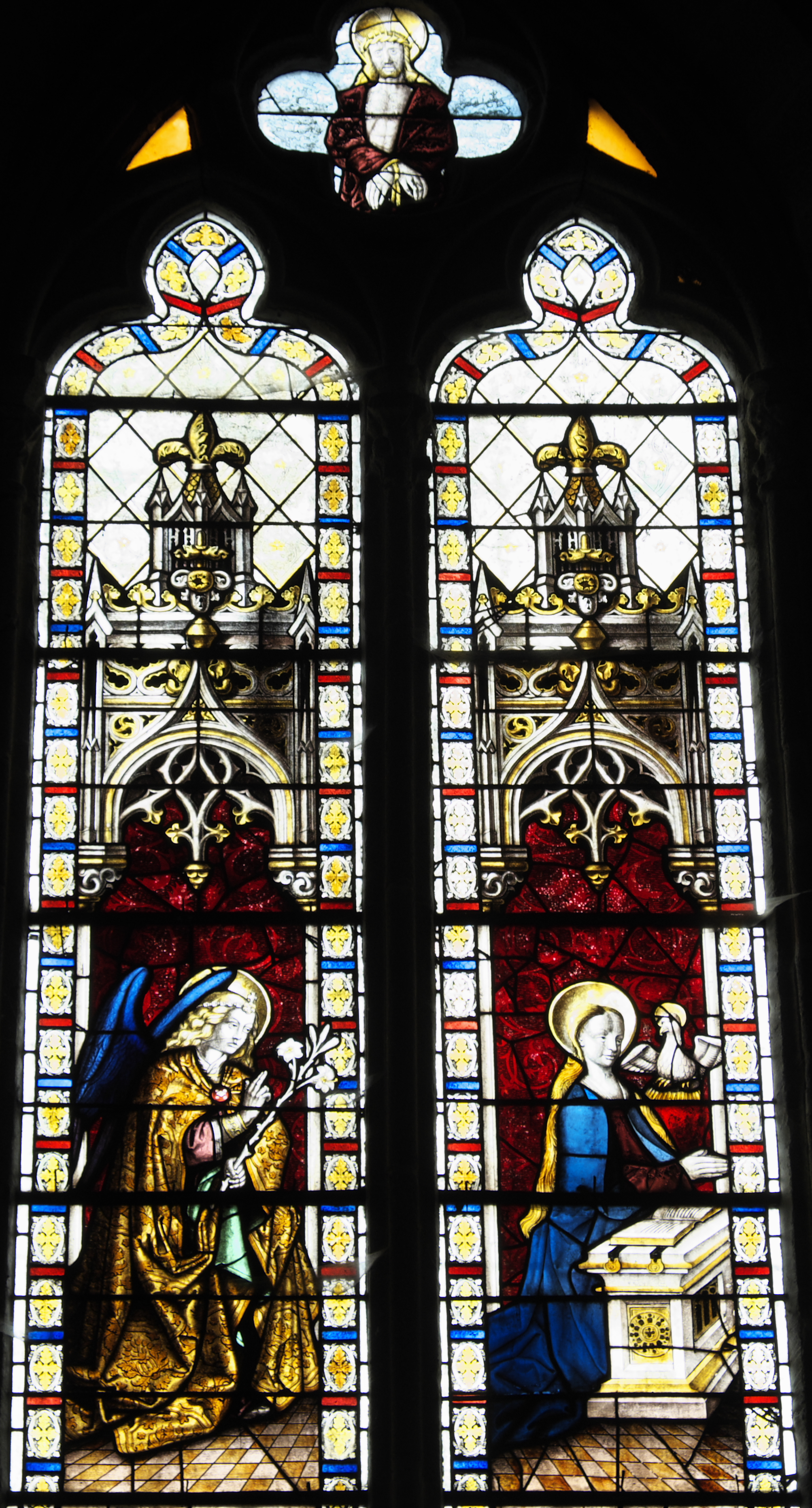 Stiftskirche Saint-Étienne in Eymoutiers im Département Haute-Vienne (Nouvelle-Aquitaine/Frankreich), Bleiglasfenster (baie 13) mit Fragmenten aus dem 15. Jahrhundert, von Lucien Léopold Lobin 1872 ergänzt und neu zusammengesetzt; Darstellung: Verkündigung